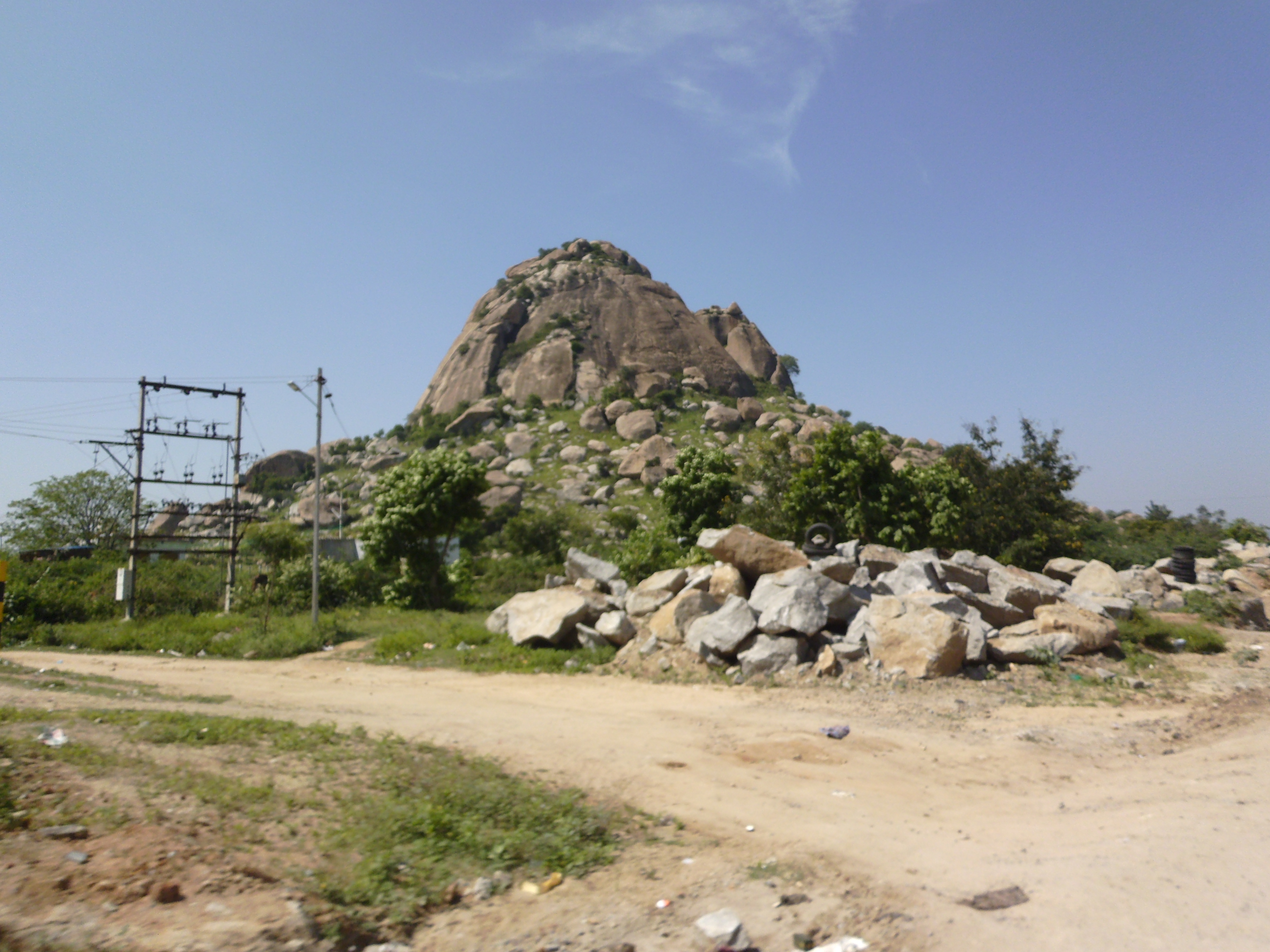 Koosu Malai